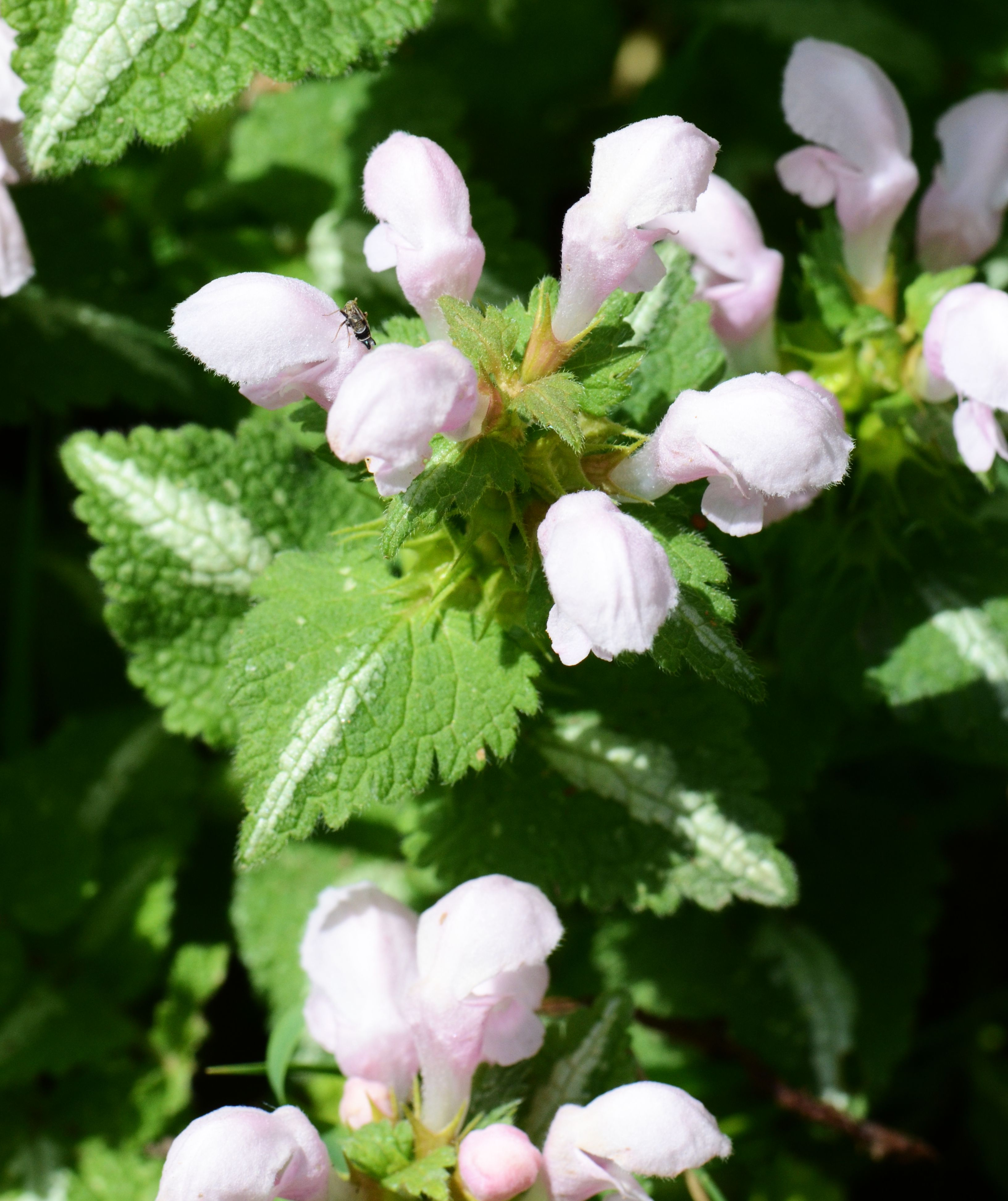 Feuille maculée